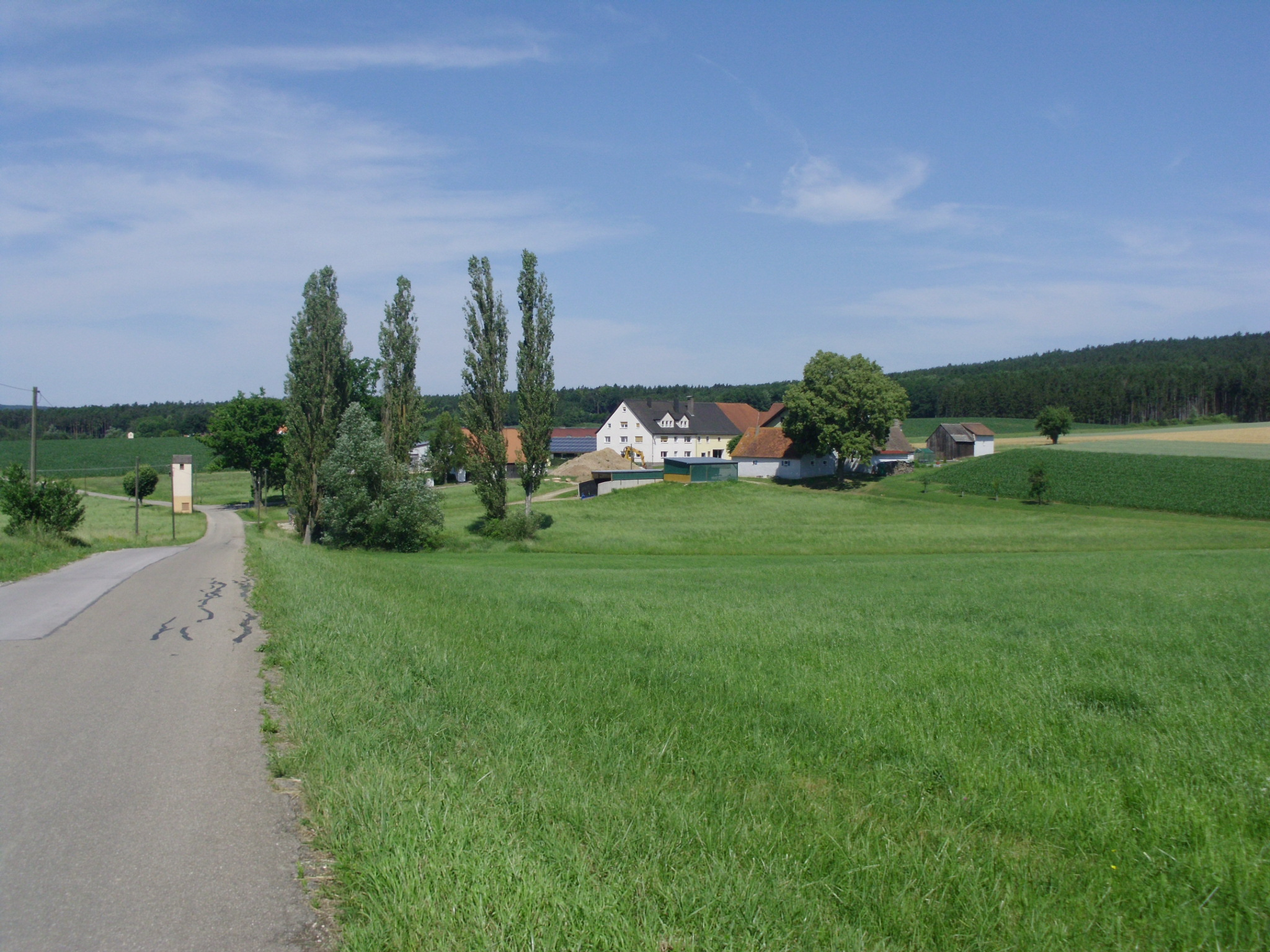 Metzenhof, Ortsteil von Treuchtlingen im Landkreis Weißenburg-Gunzenhausen